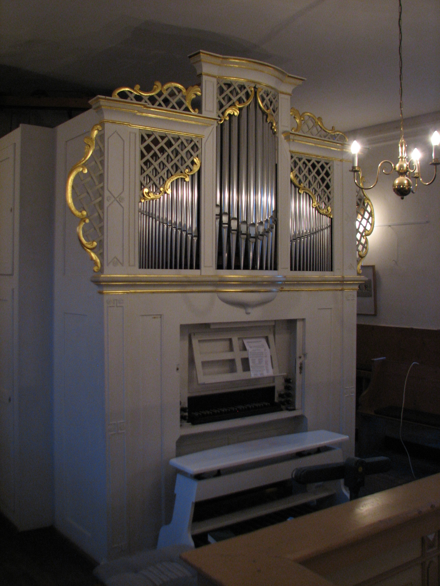 Flemming-Orgel in der Kirche Panitzsch, Foto von 2019